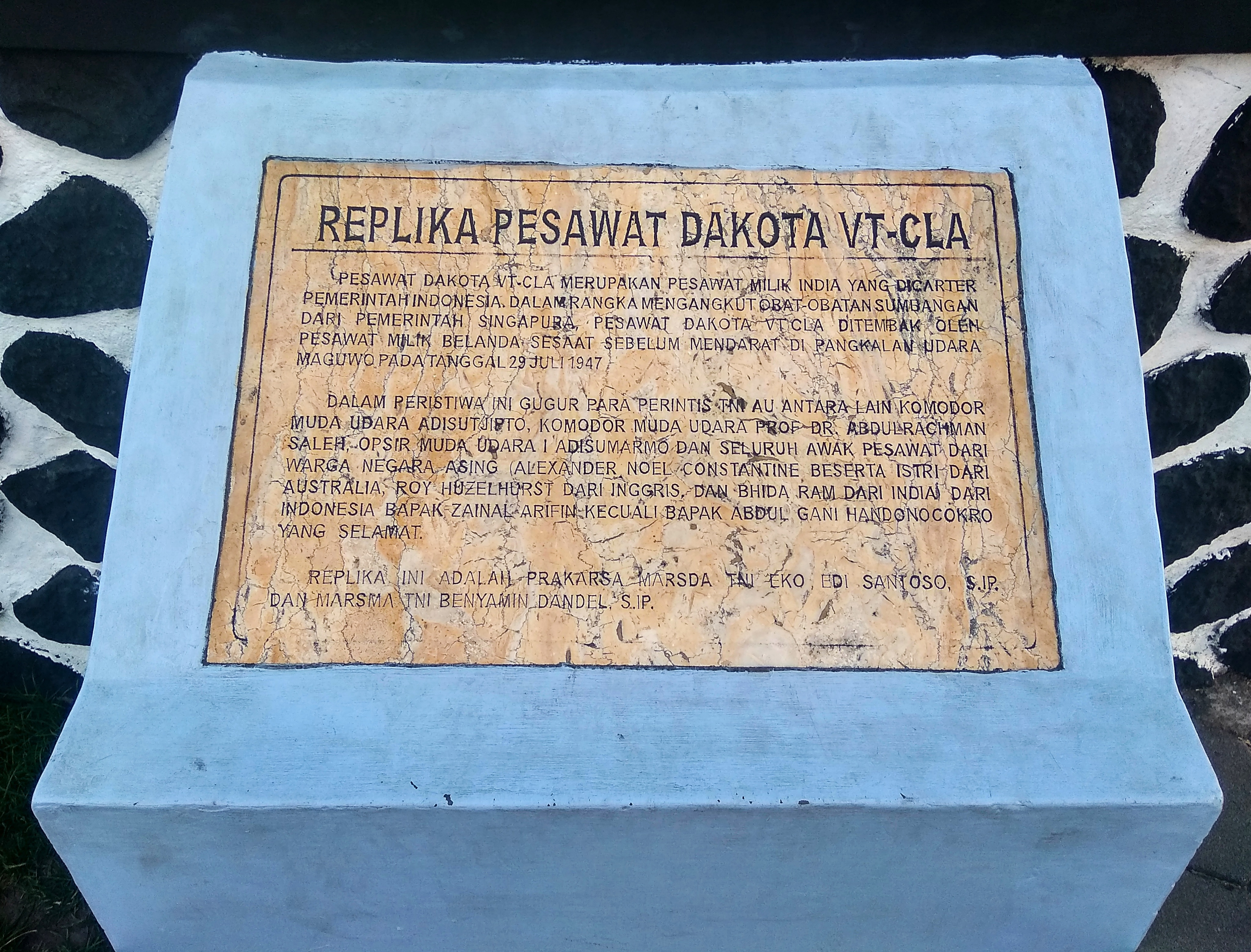 Dakota VT-CLA adalah kode pesawat yang ditembak jatuh oleh P-40 Kittyhawk Belanda pada tanggal 29 Juli 1947 di Dusun Pandeyan, Kelurahan Bangunharjo, Kecamatan Sewon, Kabupaten Bantul.